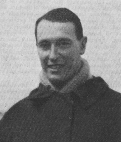 Aviatore italiano, Aimone Roberto Margherita Maria Giuseppe Torino di Savoia Aosta (Torino, 9 marzo 1900 – Buenos Aires, 29 gennaio 1948) membro di Casa Savoia, appartenente al ramo Savoia Aosta, ed un ammiraglio italiano. Fu anche Re di Croazia col nome di Tomislavo II.